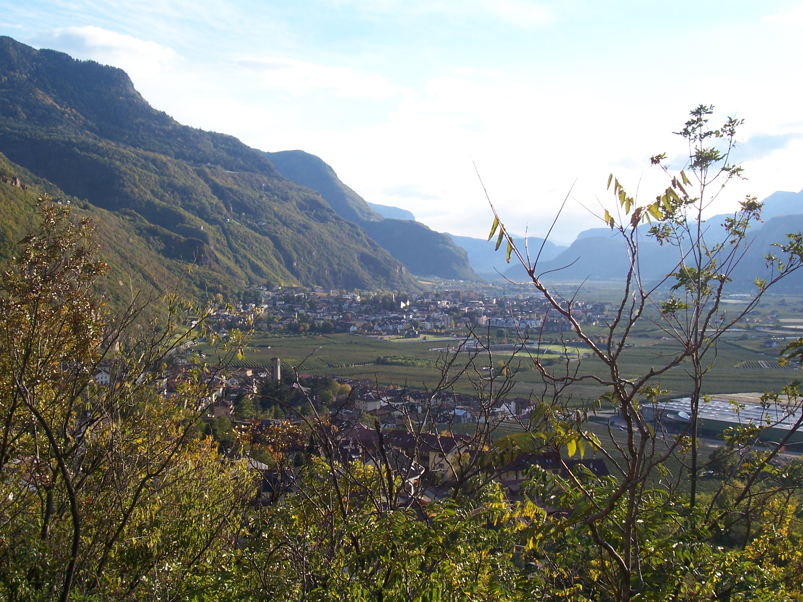 Veduta di Laives e Pineta - Ansicht von Leifers und Steinmannwald - Panorama of Laives and Pineta